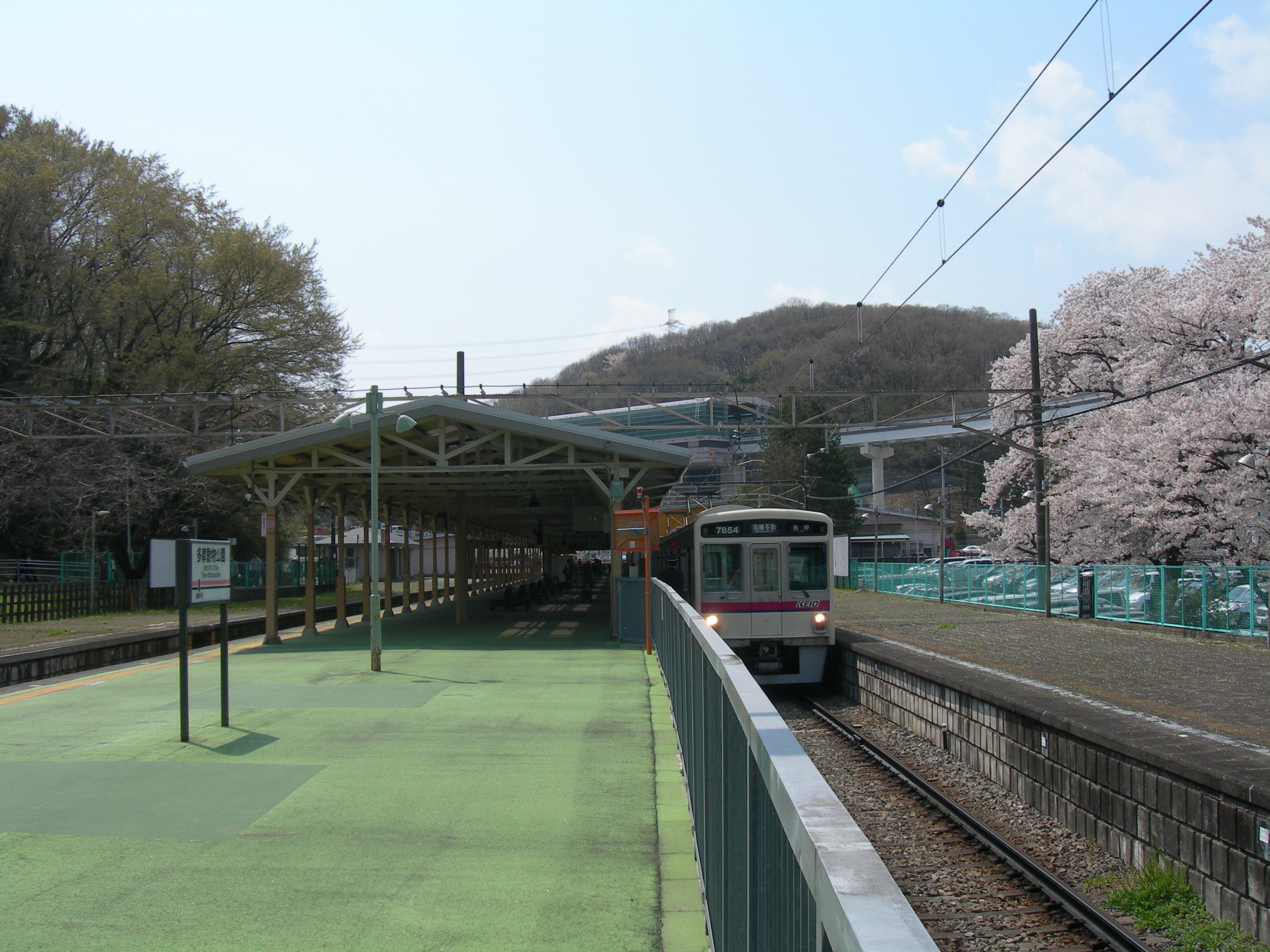 多摩動物公園駅プラットホーム